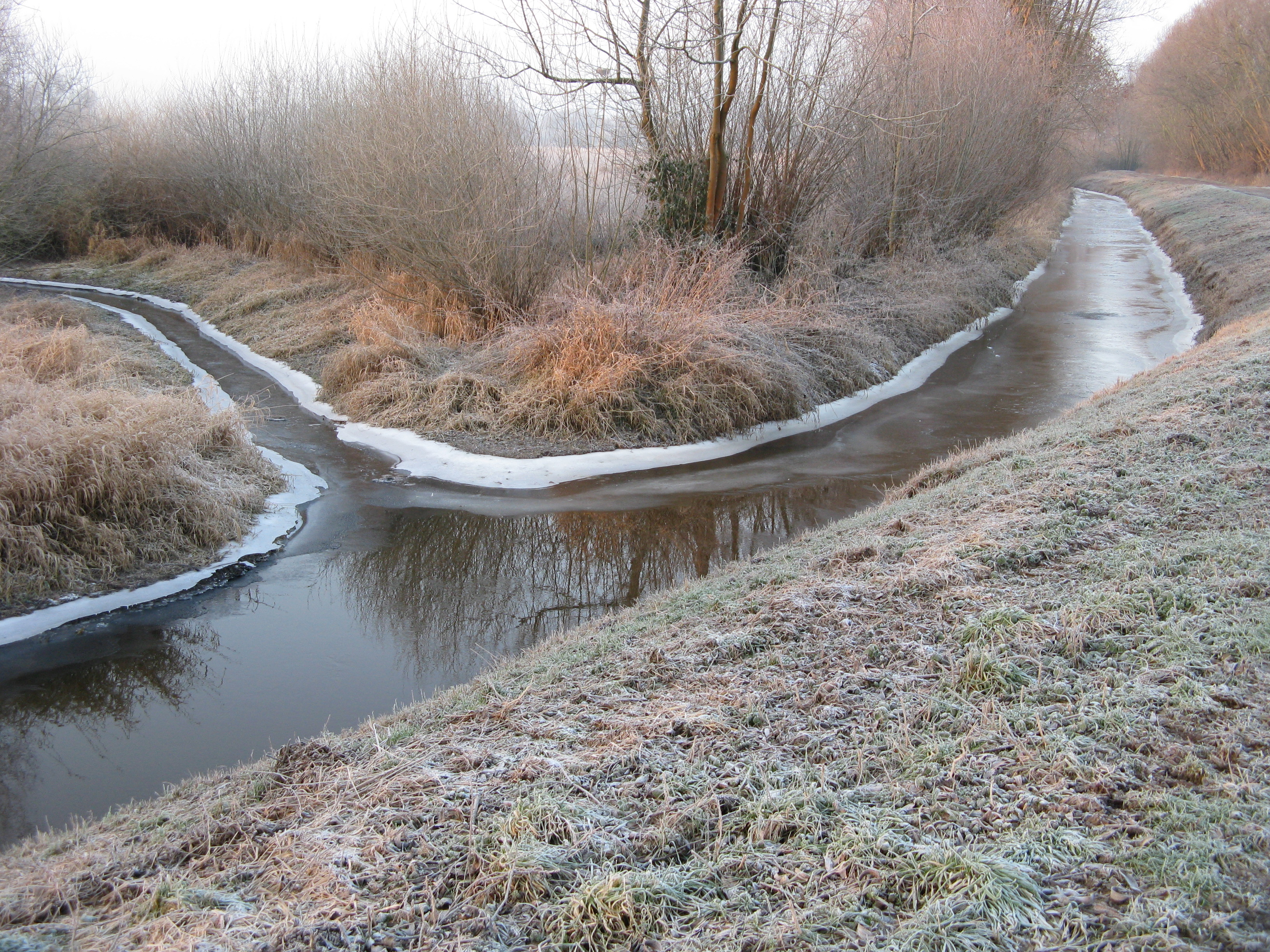 Der Wesernebenfluss Bastau im Naturschutzgebiet Bastauwiesen im Kreis Minden-Lübbecke in Nordrhein-Westfalen. Die Bastau nimmt zahlreiche Gräben auf, die zur Entwässerung der moorigen Landschaft angelegt wurden.